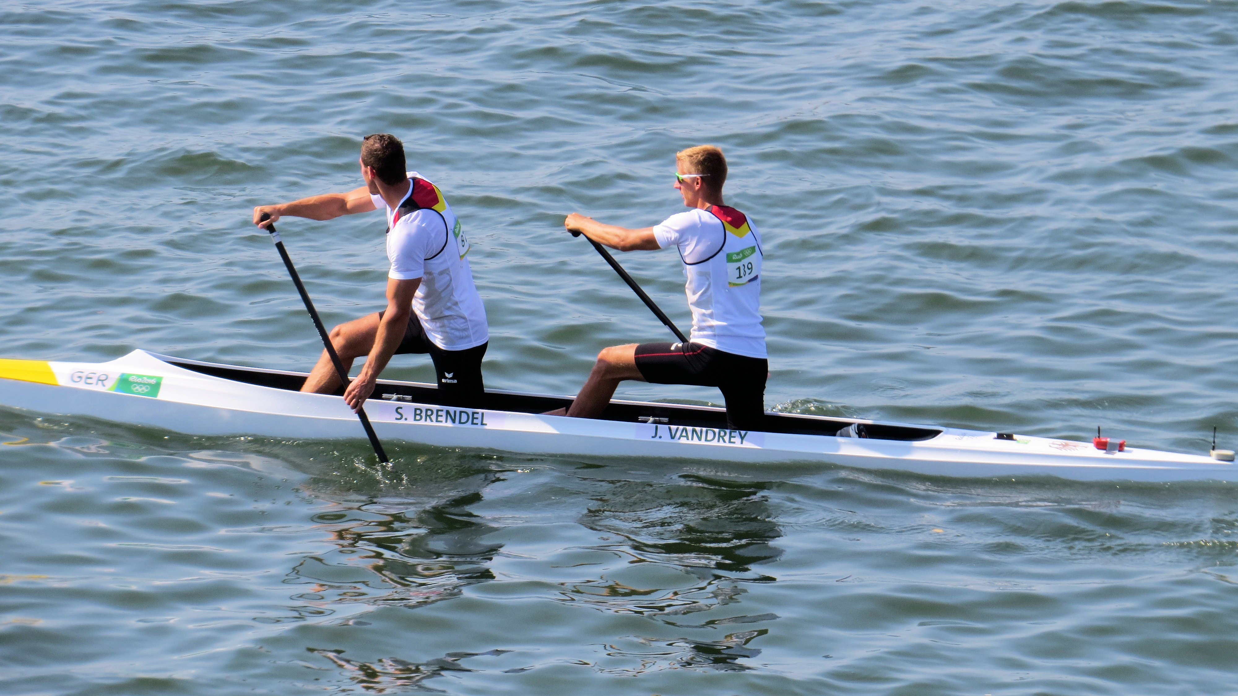 Sx50